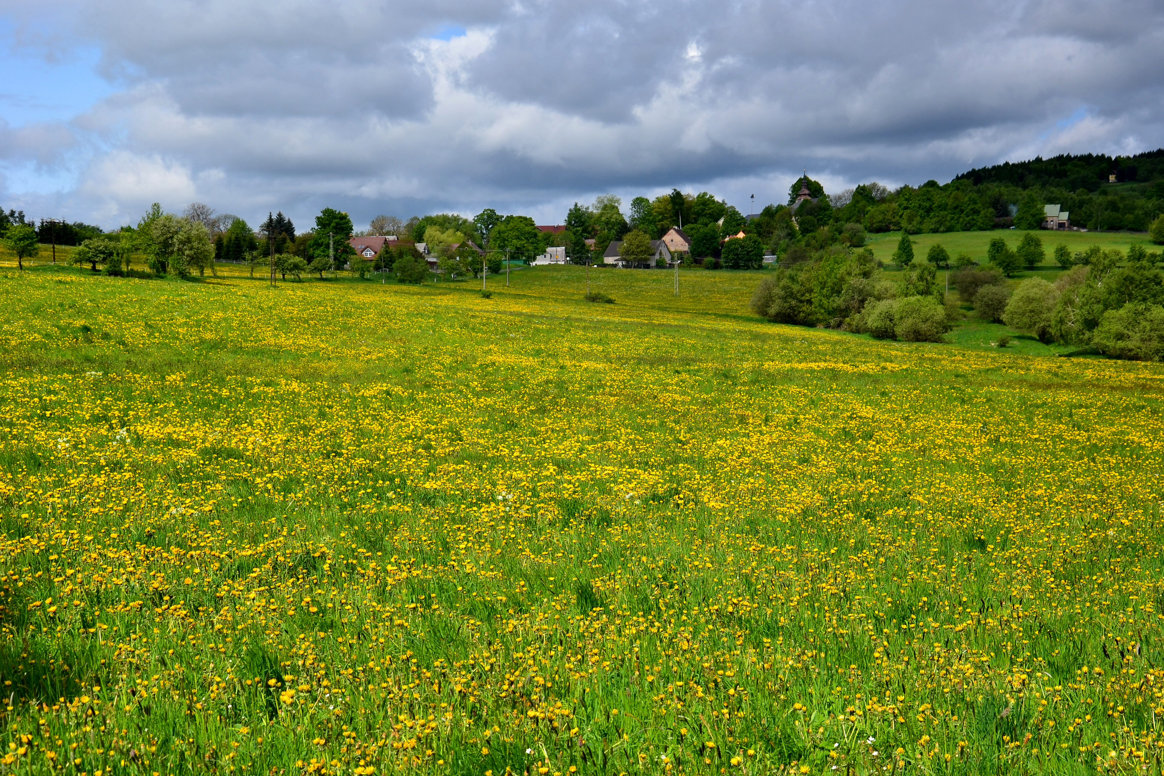 Krajina východně od Blatna